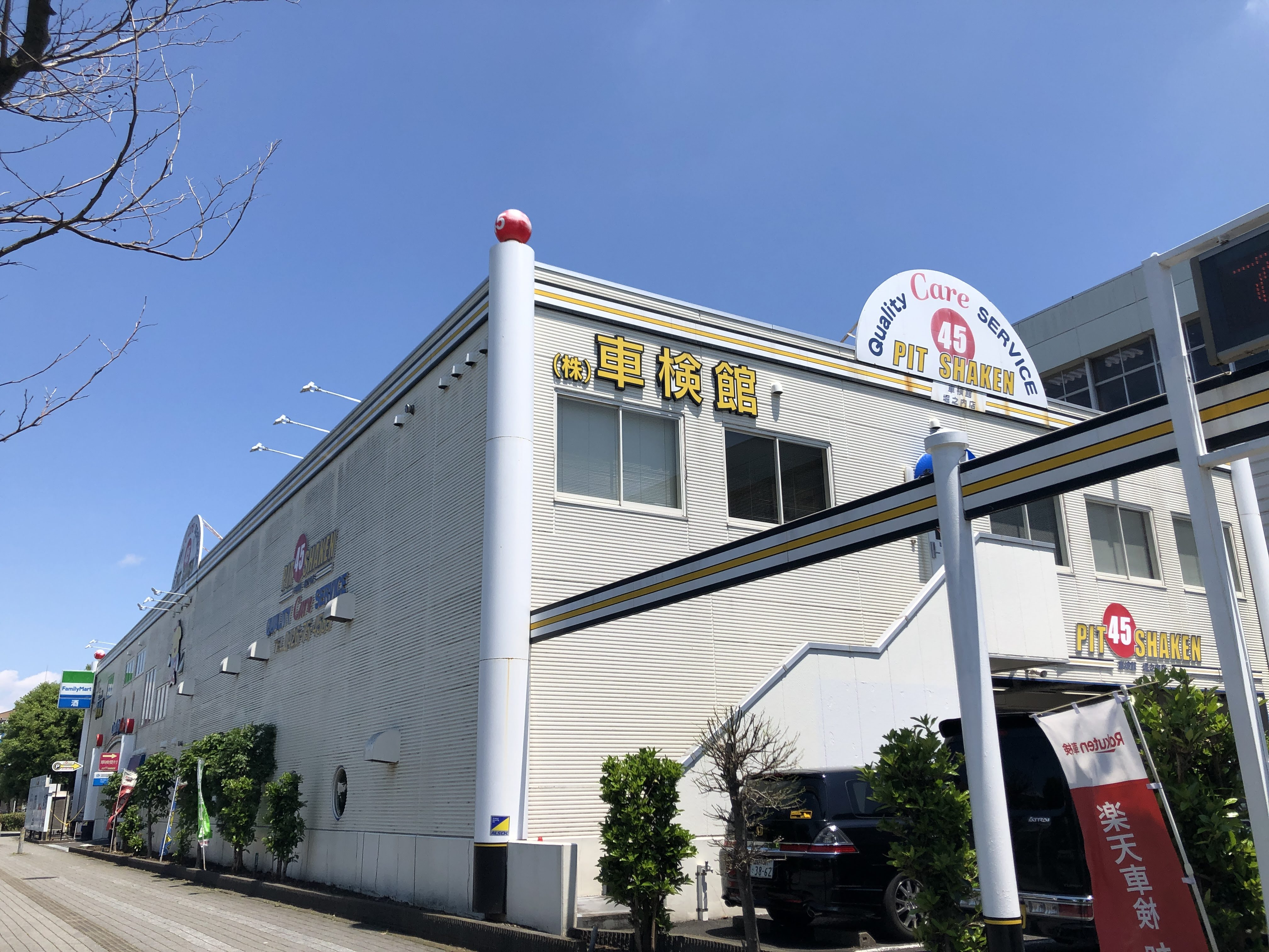 外観